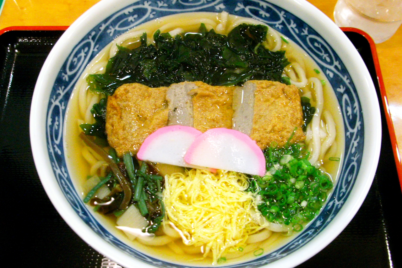 市電松山駅の地下街のうどん屋で食べたじゃこ天うどん。 10/27の松山撮影旅行より。